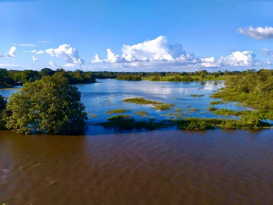 río